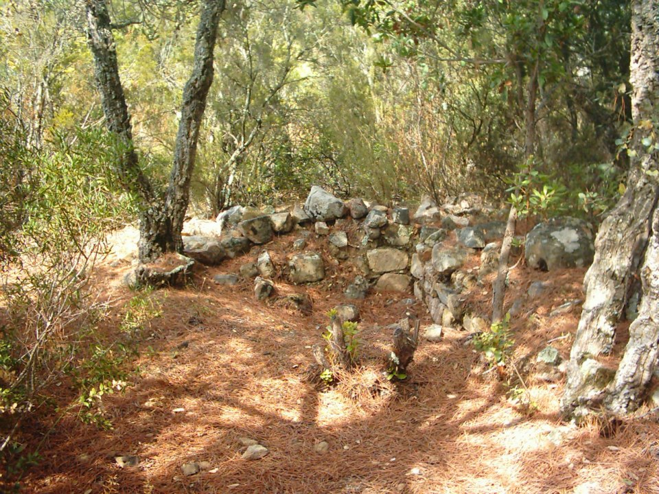 Restes de l'església de Vilademont (Tossa de Mar, Girona)